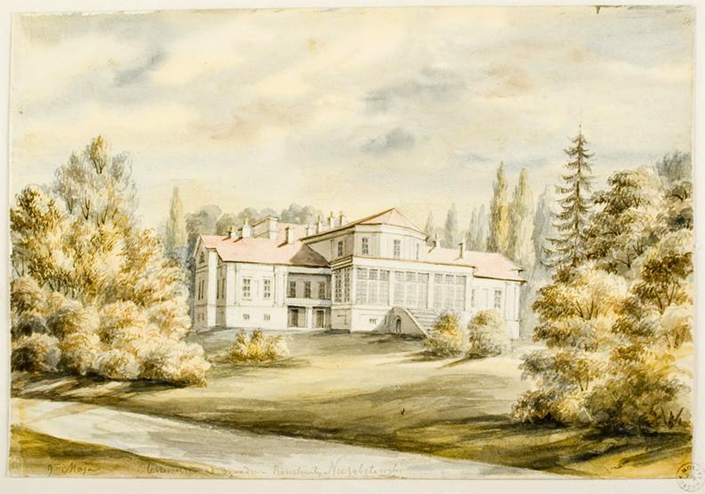 Беларуская (тарашкевіца): Алешавічы (Alešavičy), сядзіба Незабытоўскіх (Niezabytoŭski)